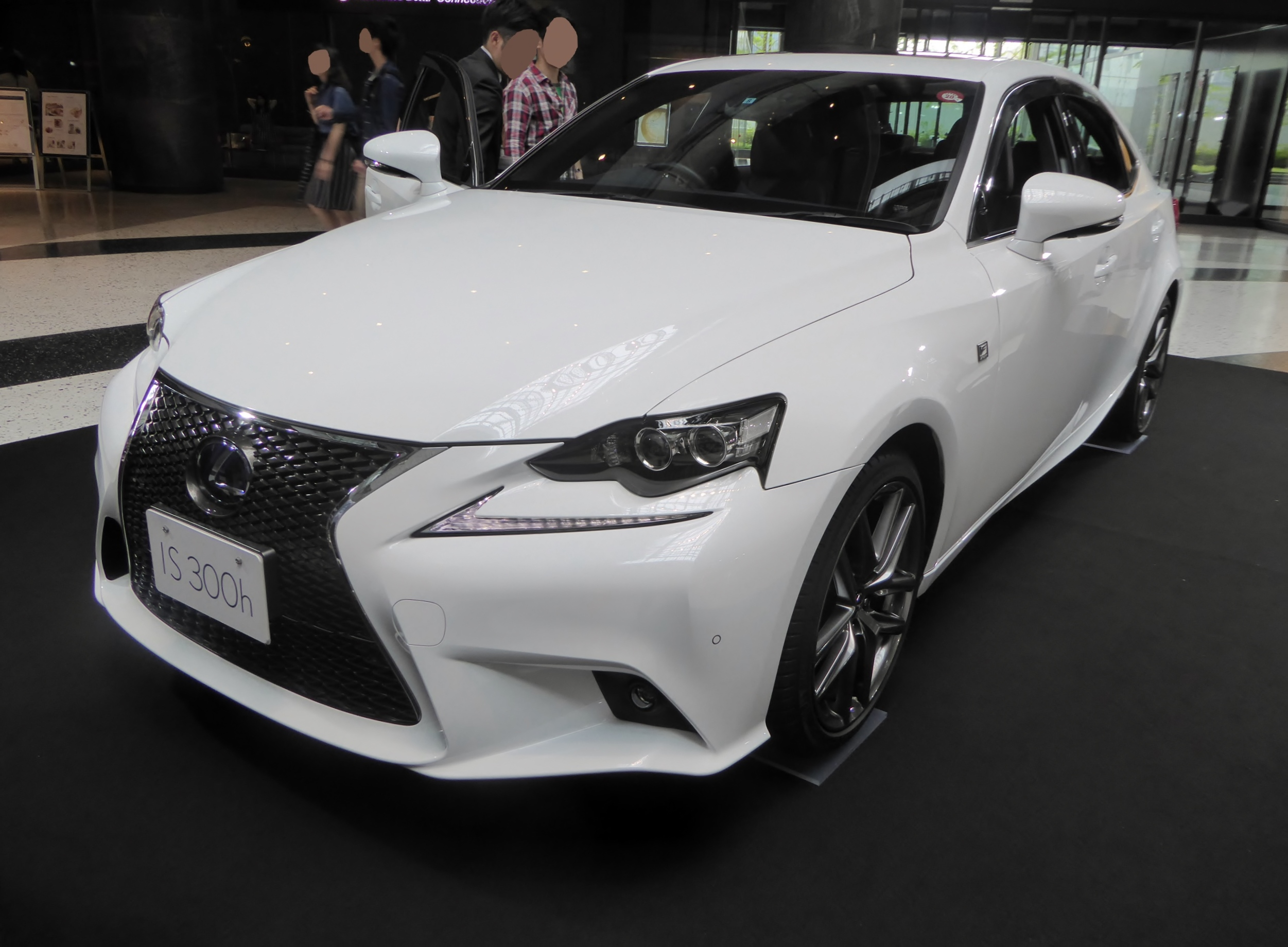 AVE30型レクサス・IS300h Fスポーツをフロントから撮影。